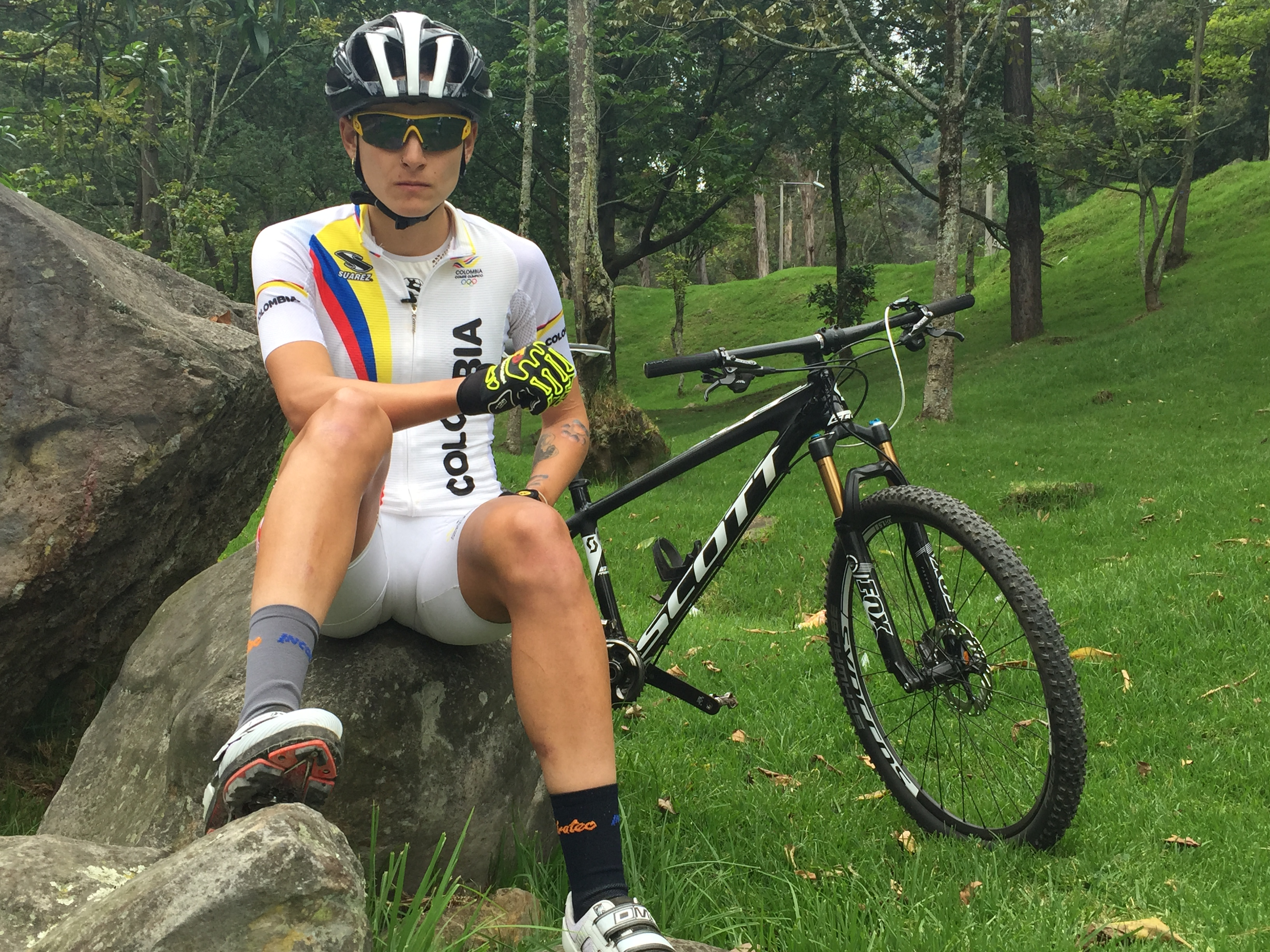 Laura Valentina Abril Ciclomontañista Colombiana y Campeona del Mundo Categoria Junior